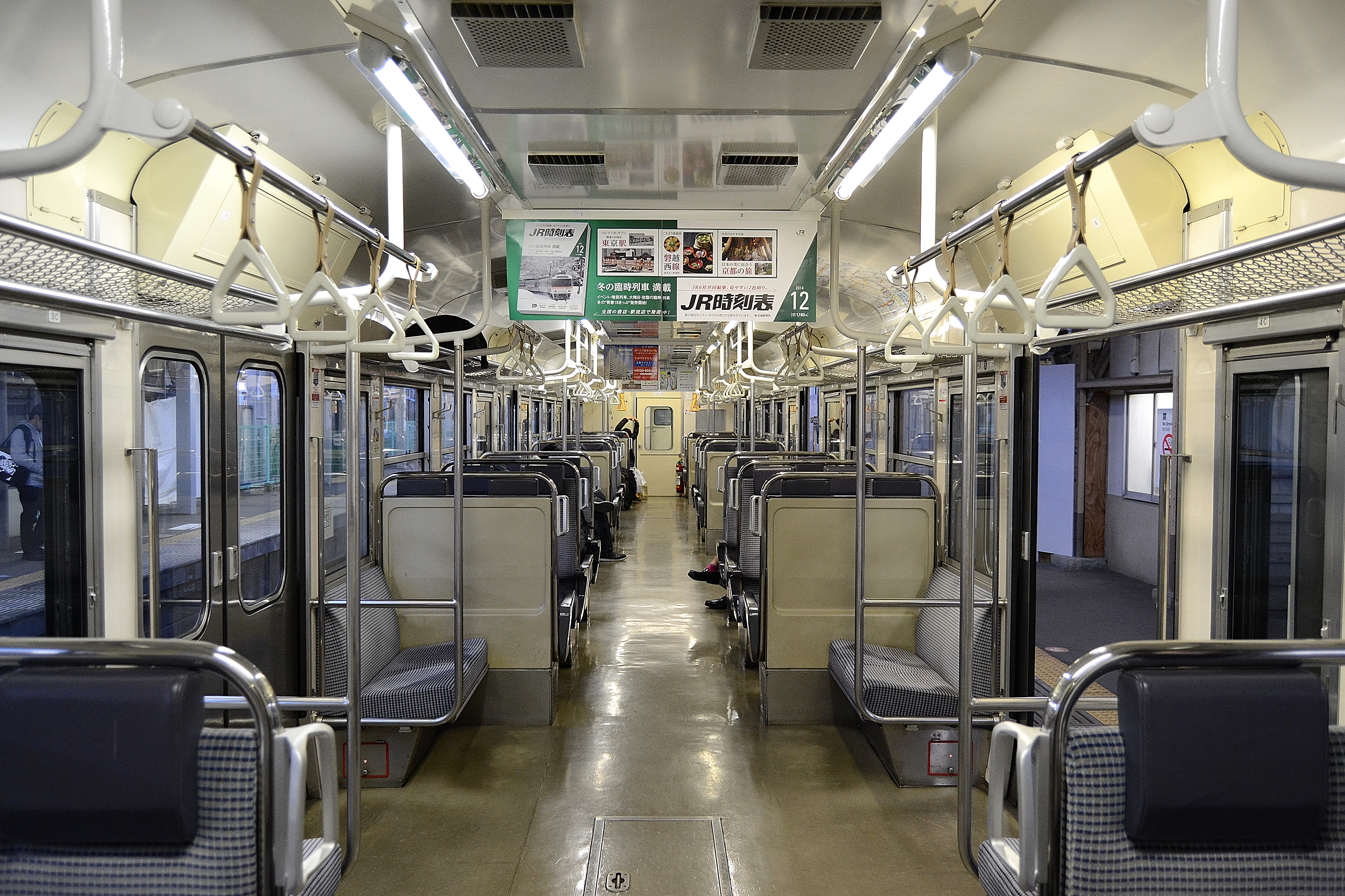 リニューアルされたJR東日本の115系電車の車内。